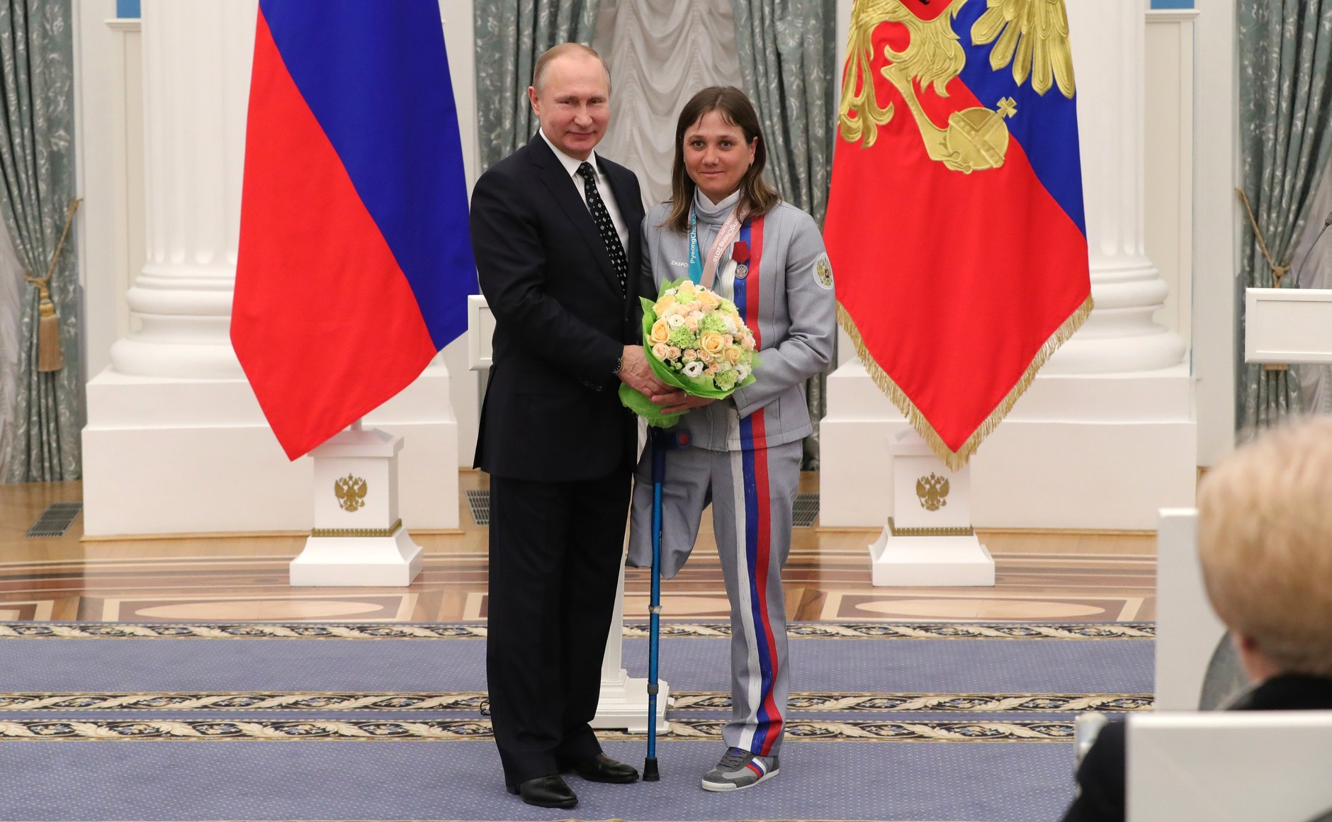 Президент России Владимир Путин с бронзовым призёром Игр по биатлону Ириной Гуляевой